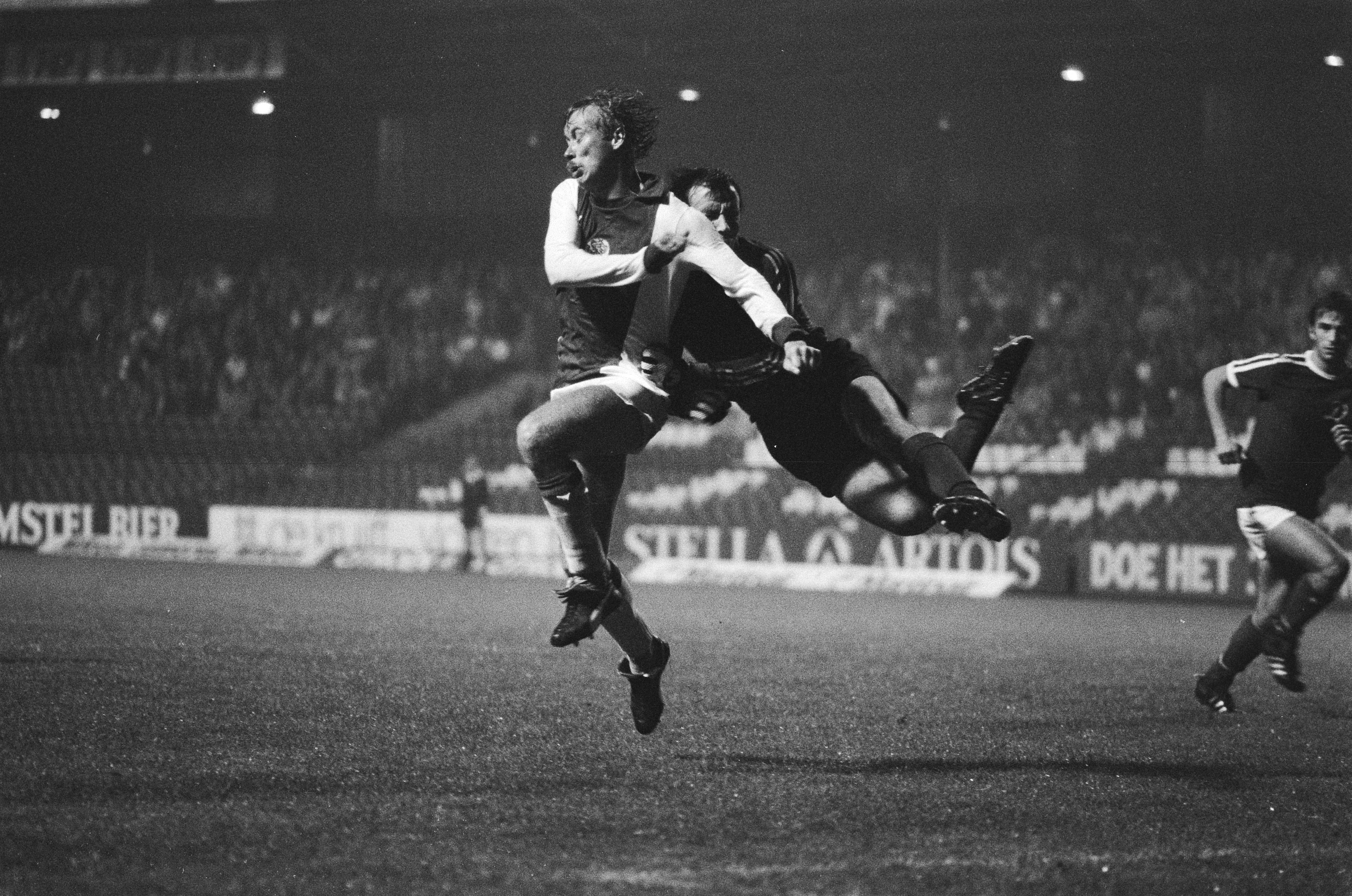 Collectie / Archief : Fotocollectie Anefo Reportage / Serie : [ onbekend ] Beschrijving : Ajax tegen Dinamo Tirana 1-0 in Ajax-stadion, Schoenake (l) in duel met Dinamo Tirana doelman Luarasi Datum : 1 oktober 1980 Trefwoorden : sport, voetbal Instellingsnaam : AJAX Fotograaf : Antonisse, Marcel / Anefo Auteursrechthebbende : Nationaal Archief Materiaalsoort : Negatief (zwart/wit) Nummer archiefinventaris : bekijk toegang 2.24.01.05 Bestanddeelnummer : 931-0539